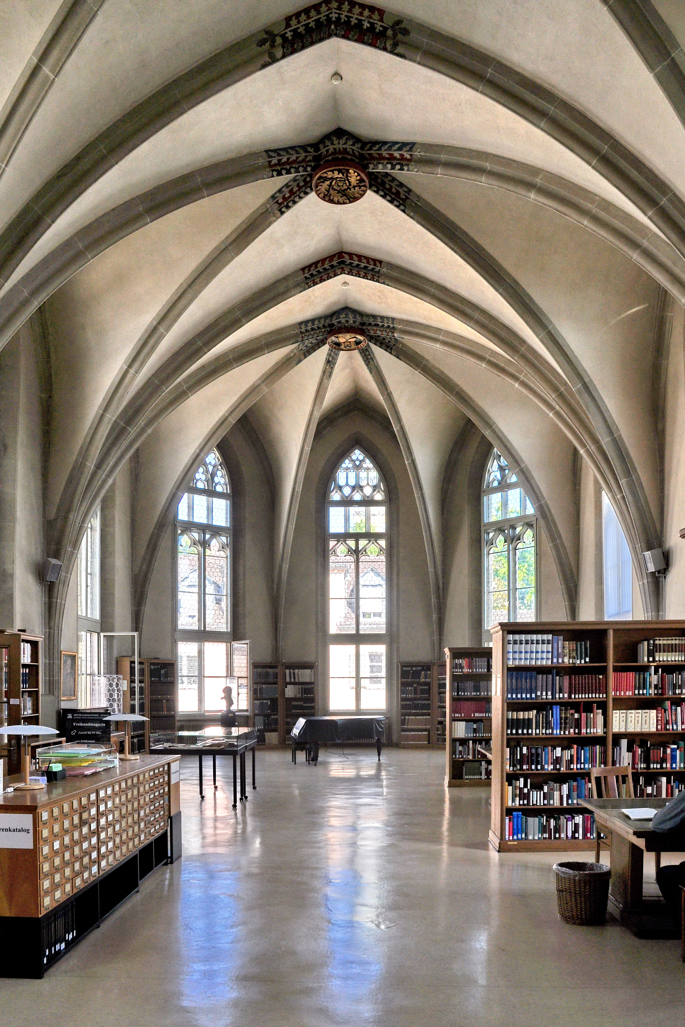 Zentralbibliothek, Musikabteilung (Predigerchor), Predigerplatz 1 in Zürich (Switzerland)